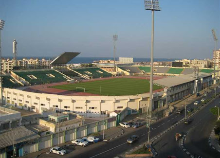 ستاد بورسعيد